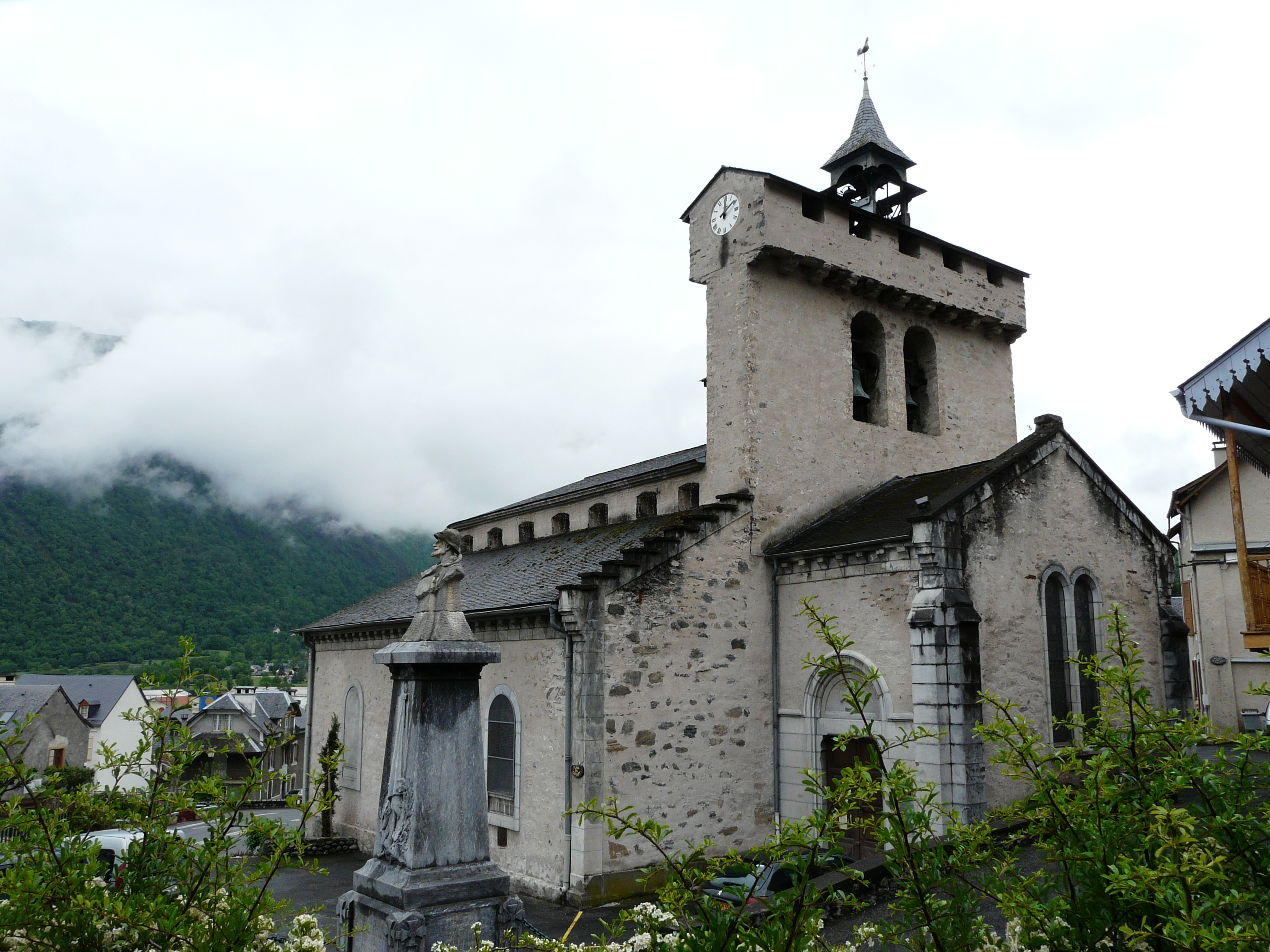 L'église Saint-André de Soulom, Hautes-Pyrénées, France.